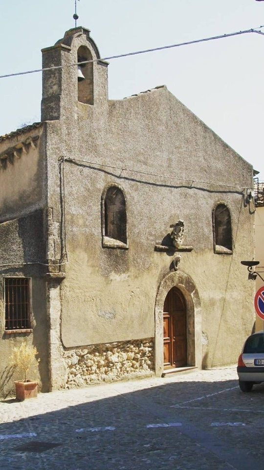 Chiesa di Santa Lucia a Cropani